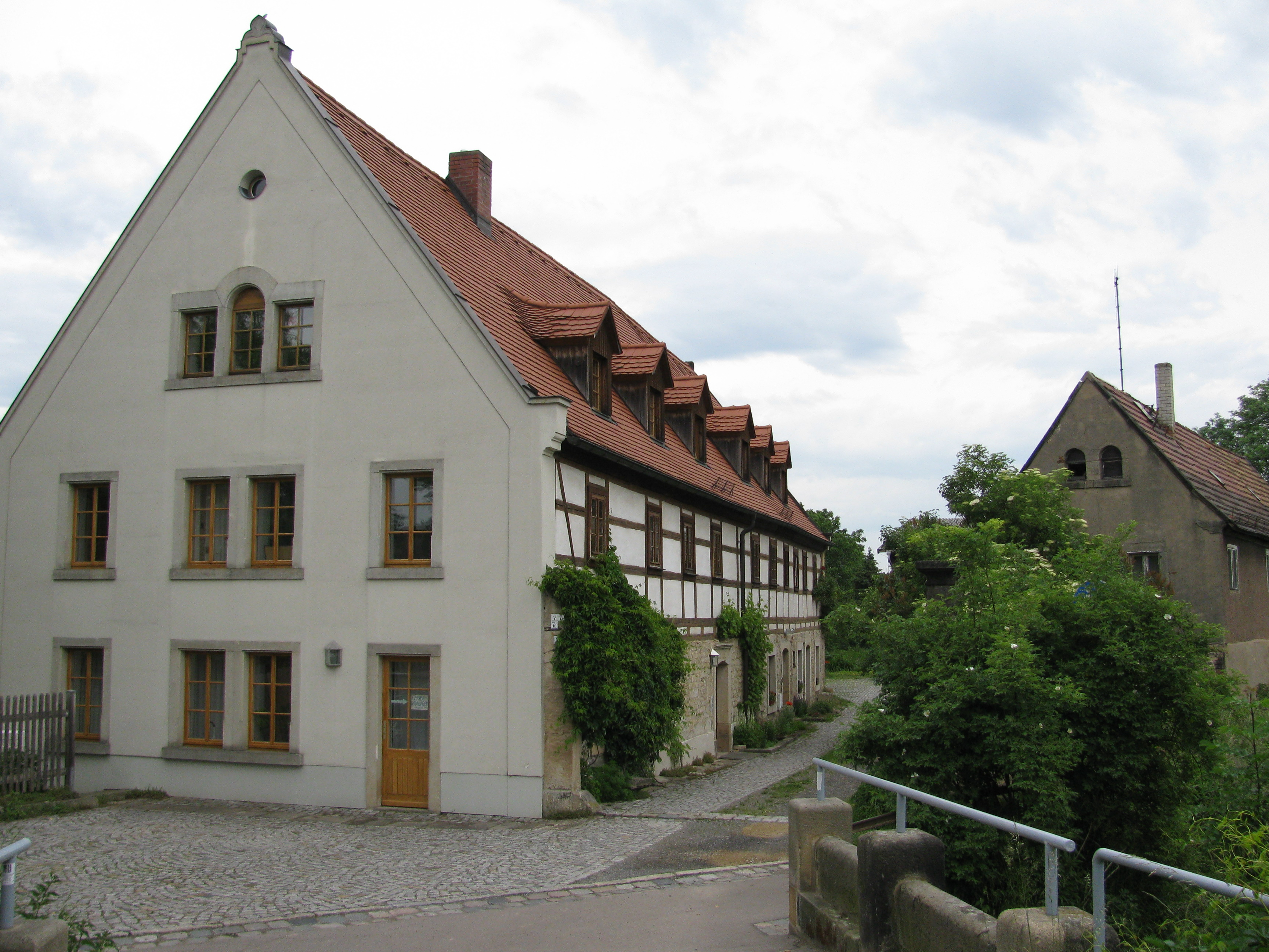 Gebäude im Dorfkern von Mockritz, Stadtteil von dresden